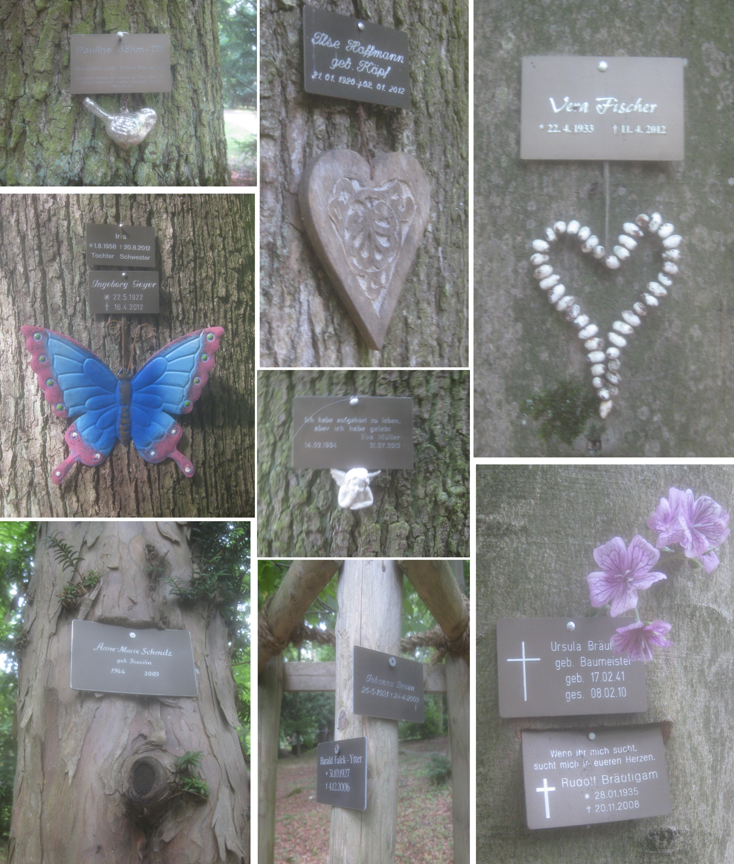 Baumgräber auf dem Waldfriedhof Stuttgart in Stuttgart.